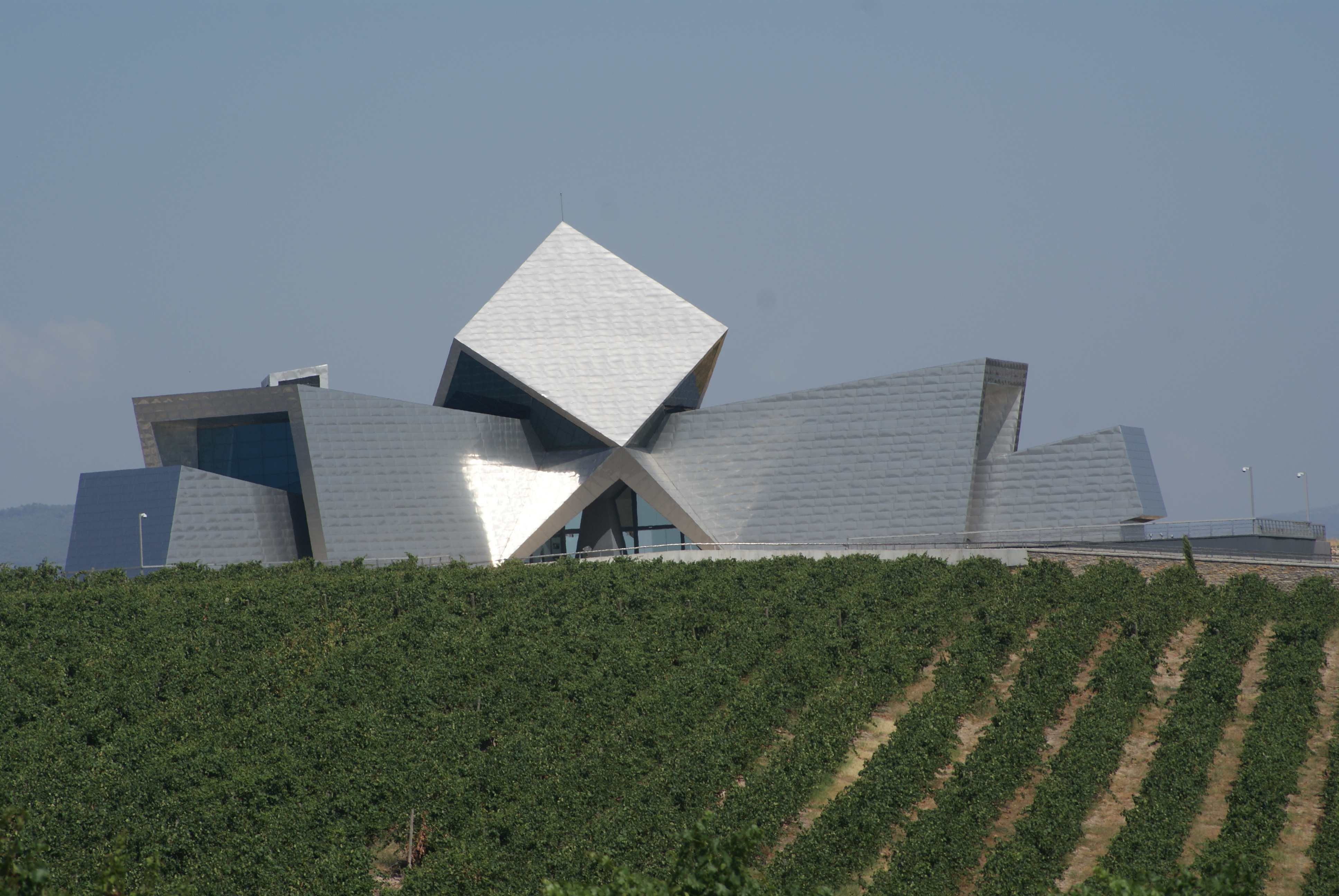 Bodega Irius en Barbastro perteneciente a la Denominación de Origen Somontano de vino.